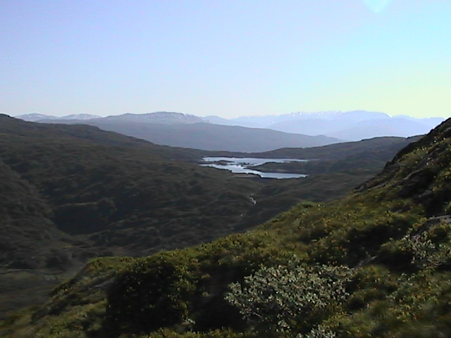 Ådnatun museum